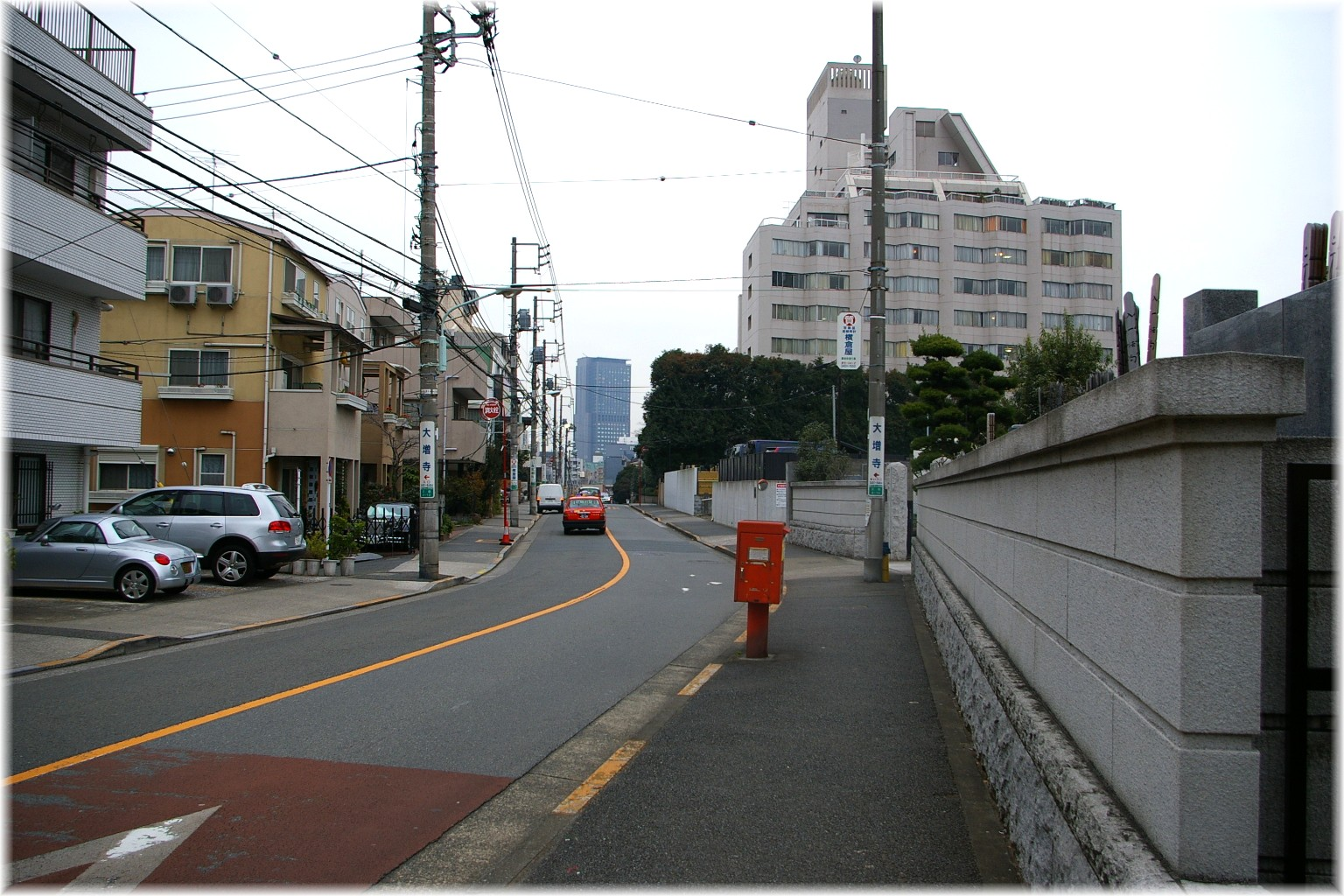 日本の東京都港区にある聖坂。